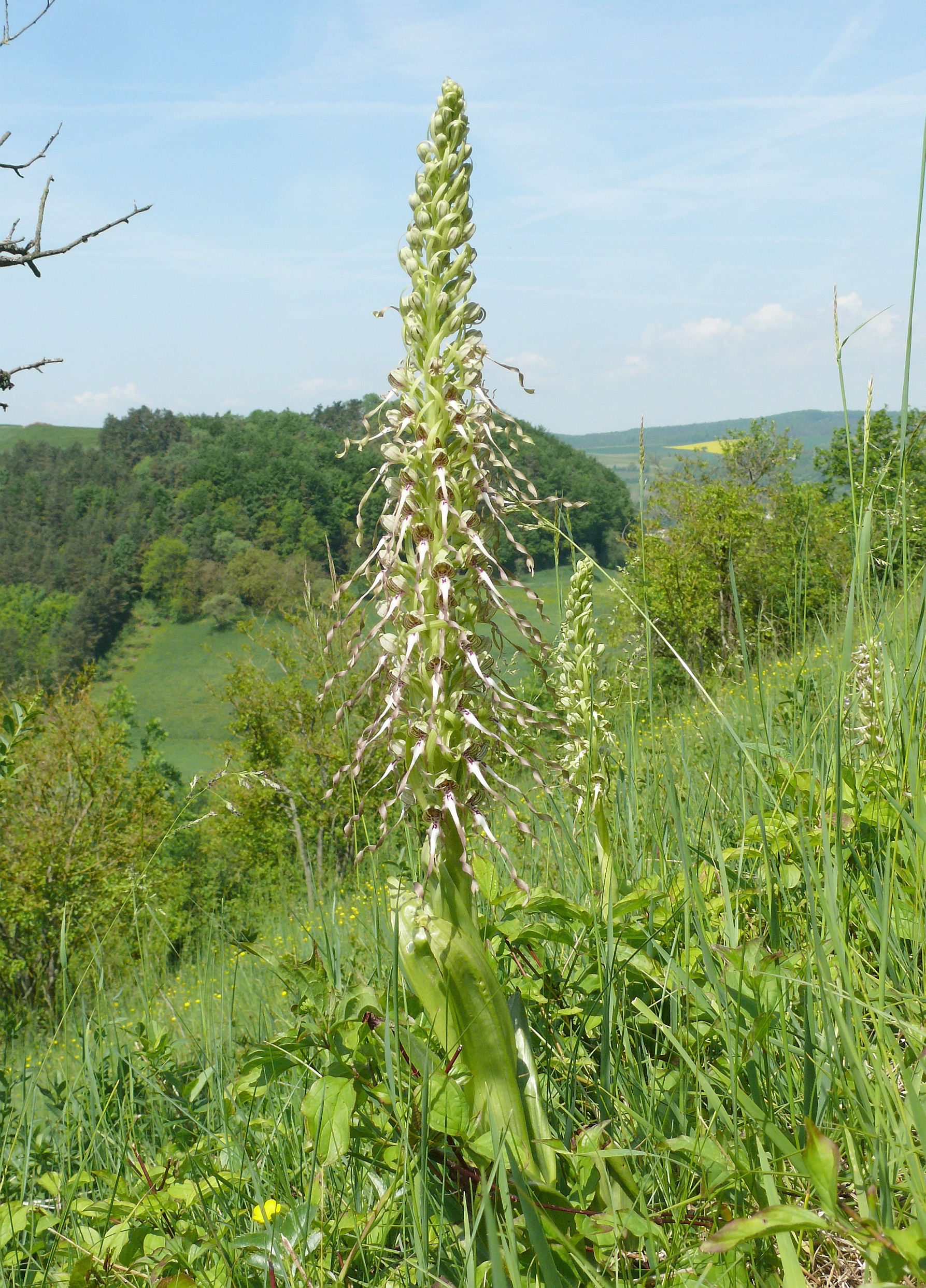 Himantoglossum hircinum, Hohenlohe, Deutschland